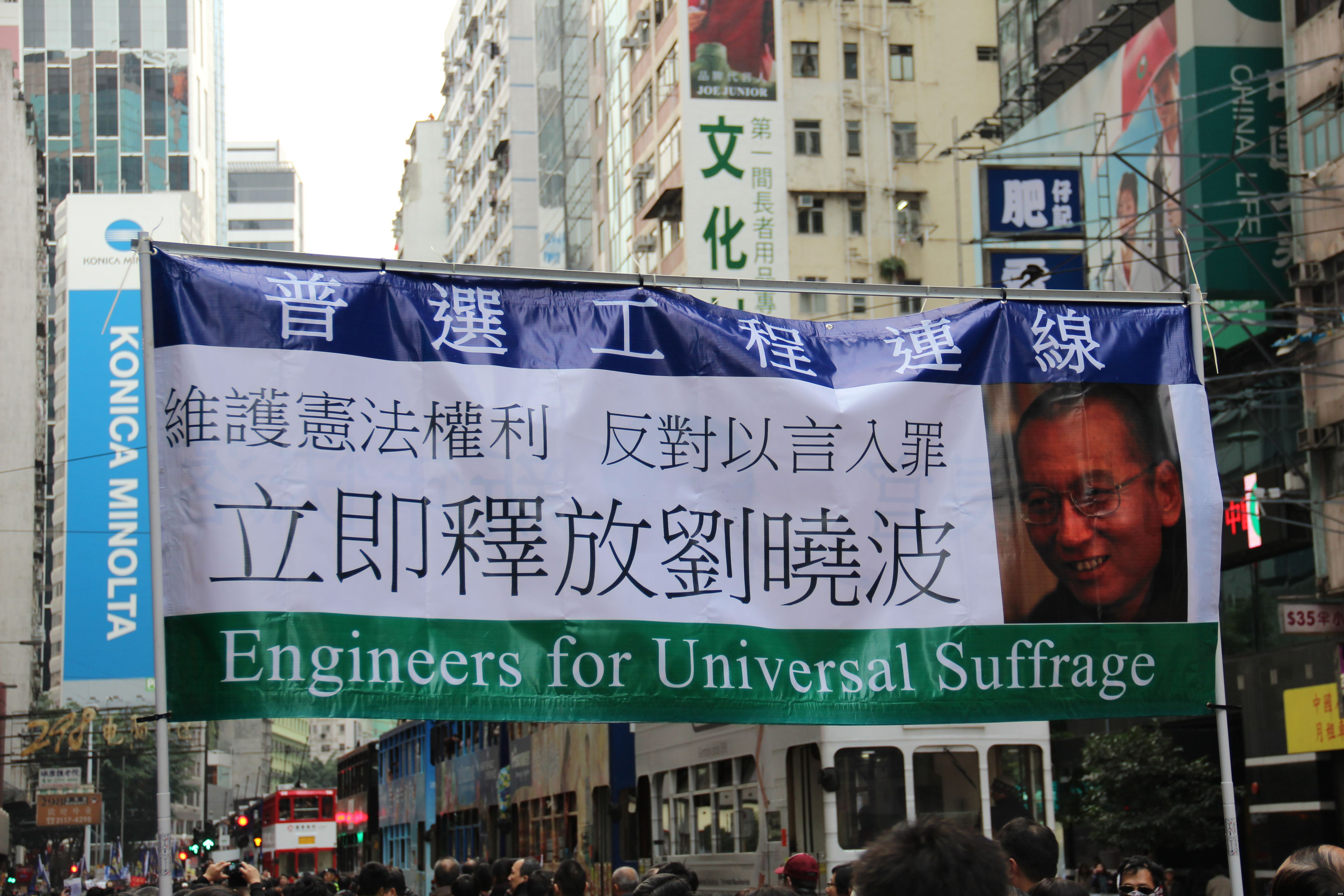 普选工程连线要求立即释放刘晓波的标语。